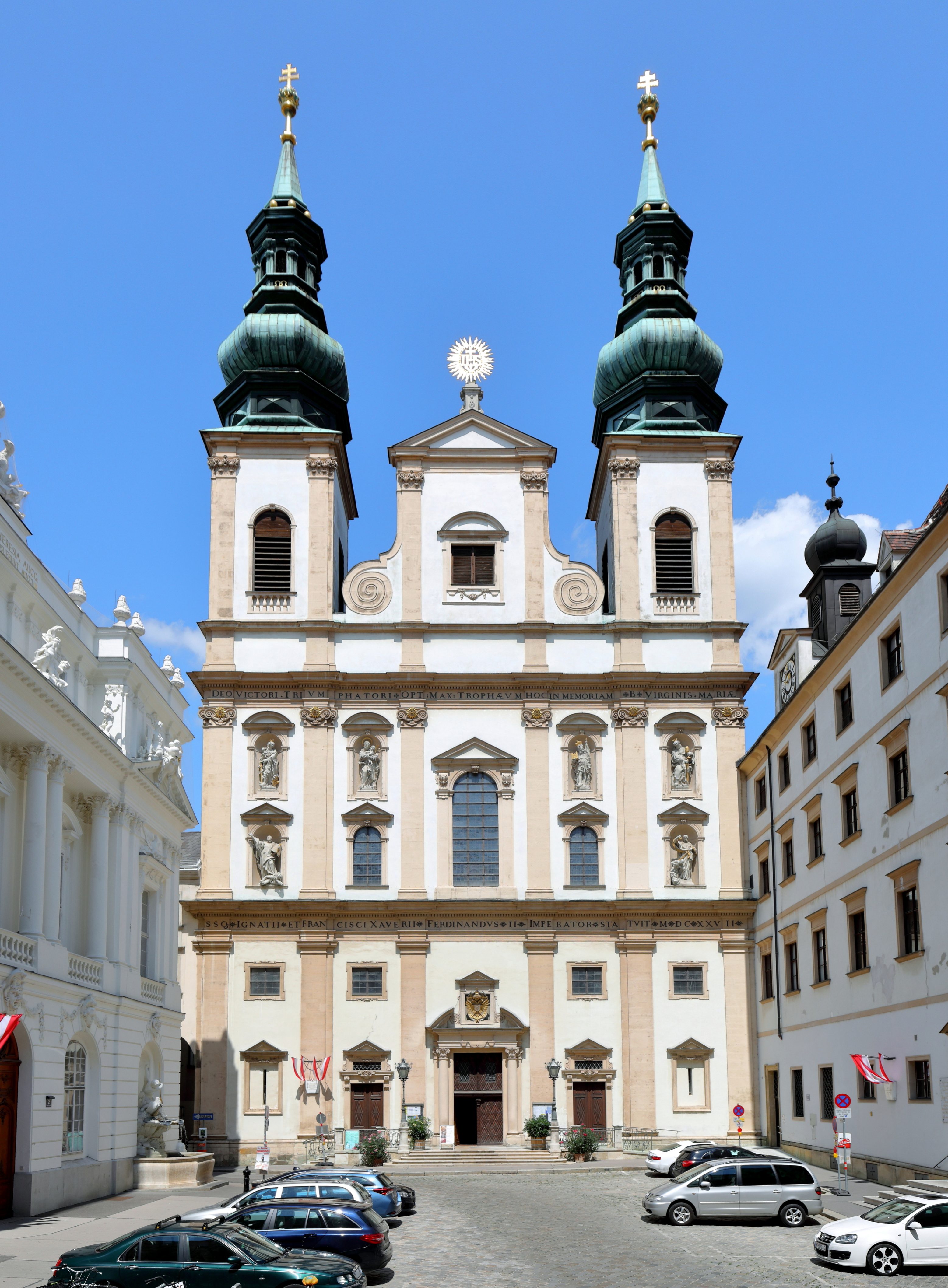 Die Universitätskirche bzw. neue Jesuitenkirche am Dr.-Ignaz-Seipel-Platz neben der alten Universität im 1. Wiener Gemeindebezirk Innere Stadt.Die Kirche wurde an der Stelle einer Kapelle um 1625 errichtet und erhielt ihre heutige Gestalt Anfang des 18. Jahrhunderts, indem unter anderem die Türme errichtete und neu fassadiert wurde. Nach der Aufhebung des Jesuitenordens 1773 ging die Kirche in den Besitz des Staates über. Nach der Wiederzulassung (1814) sind seit 1856 wieder Jesuiten in der Kirche tätig.